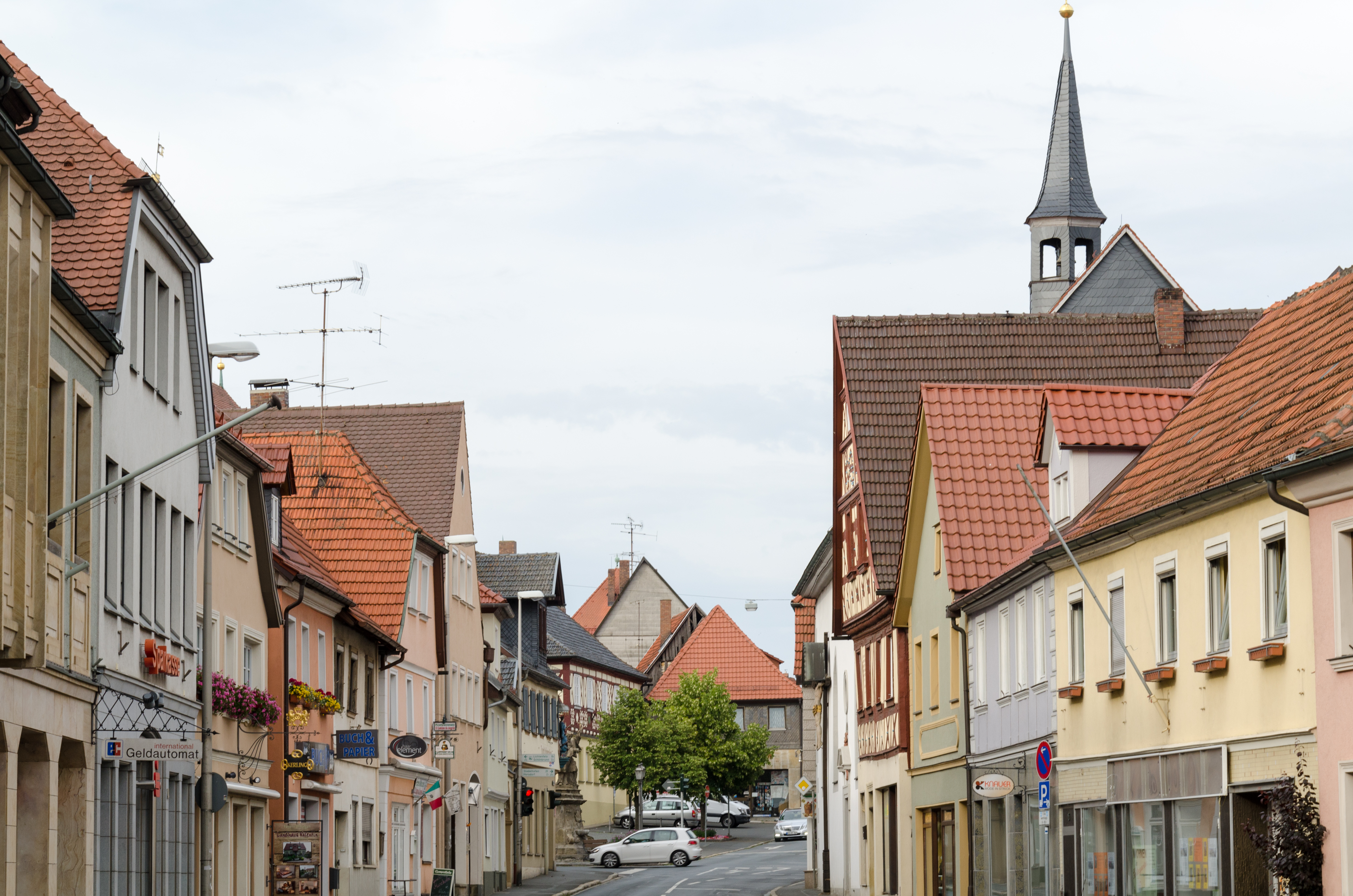 Bad Staffelstein, Bamberger Straße West-Ost